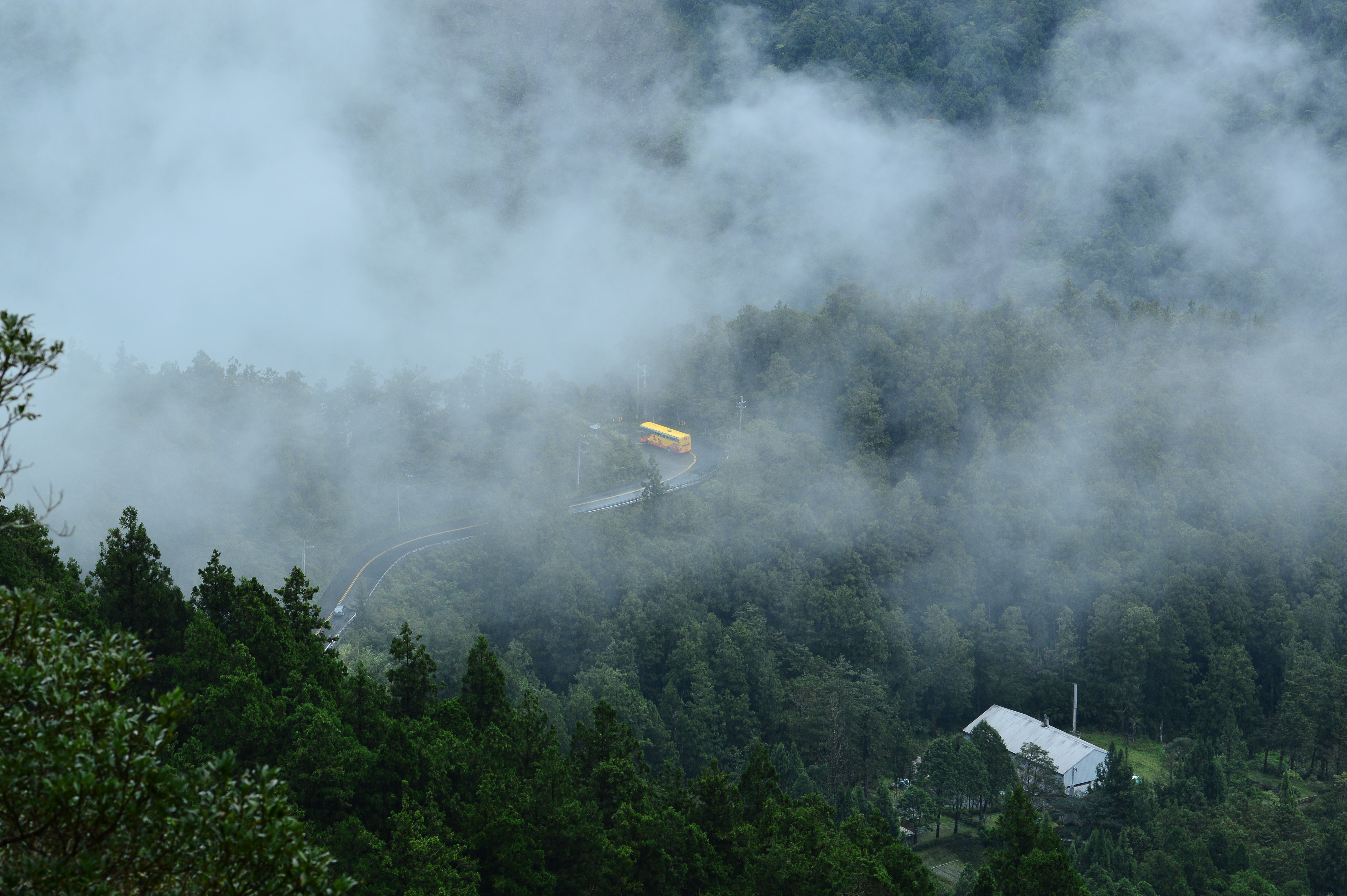 中文（台灣）: 宜蘭縣大同鄉太平林道2015